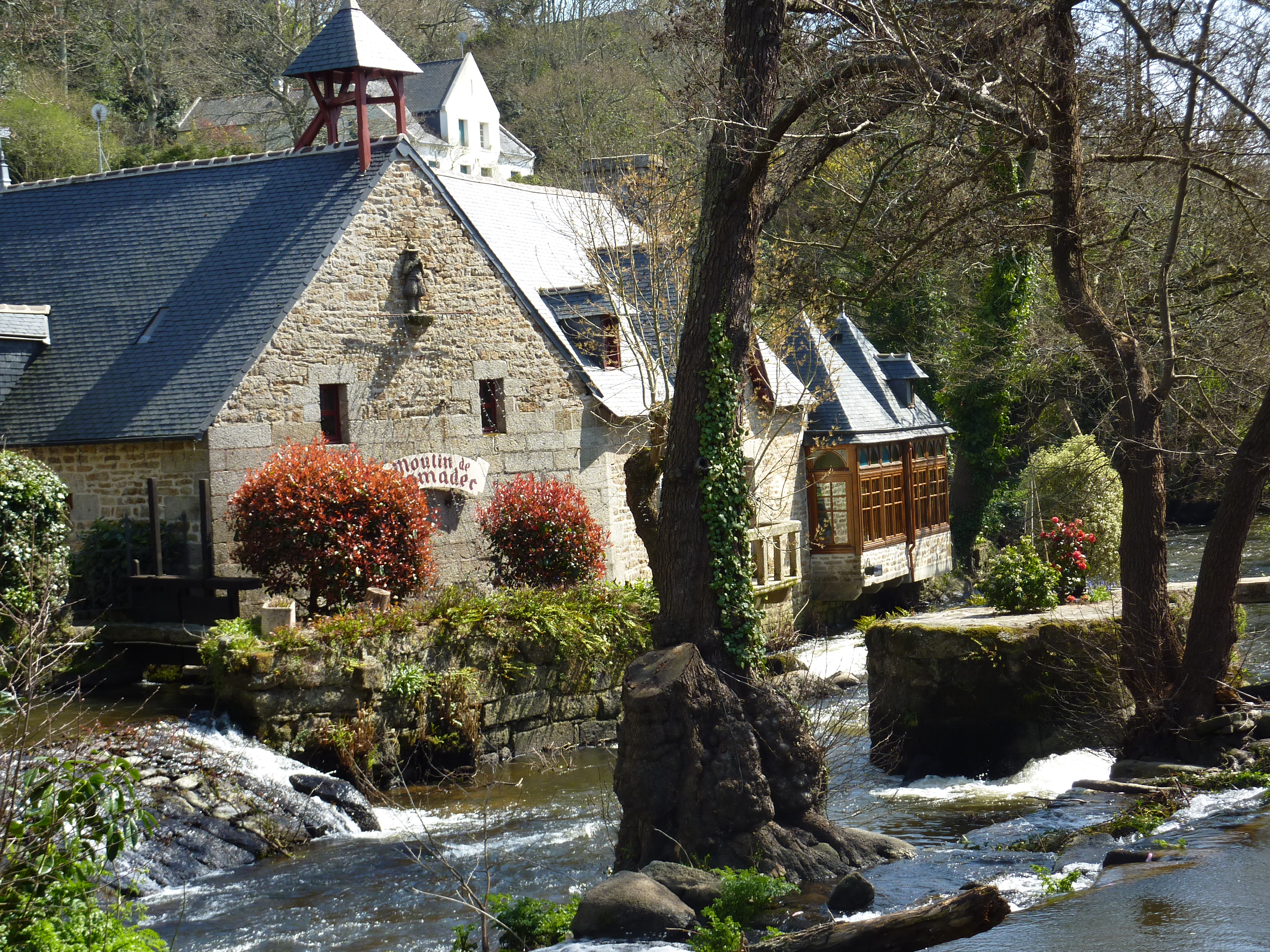 Pont-Aven : le moulin de Rosmadec en bordure de l'Aven